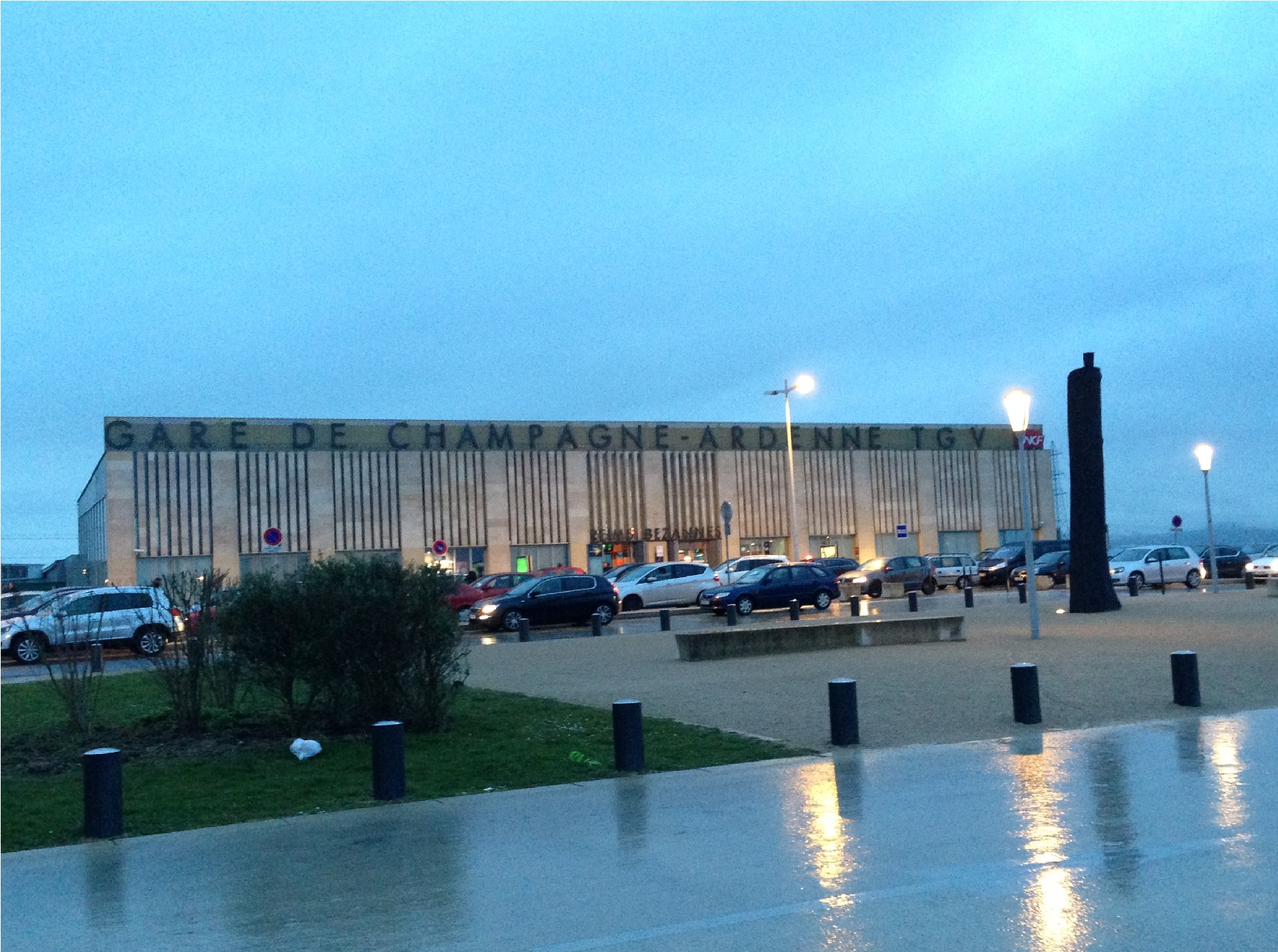 香槟-阿登TGV站外景 (La gare de Champagne-Ardenne TGV)